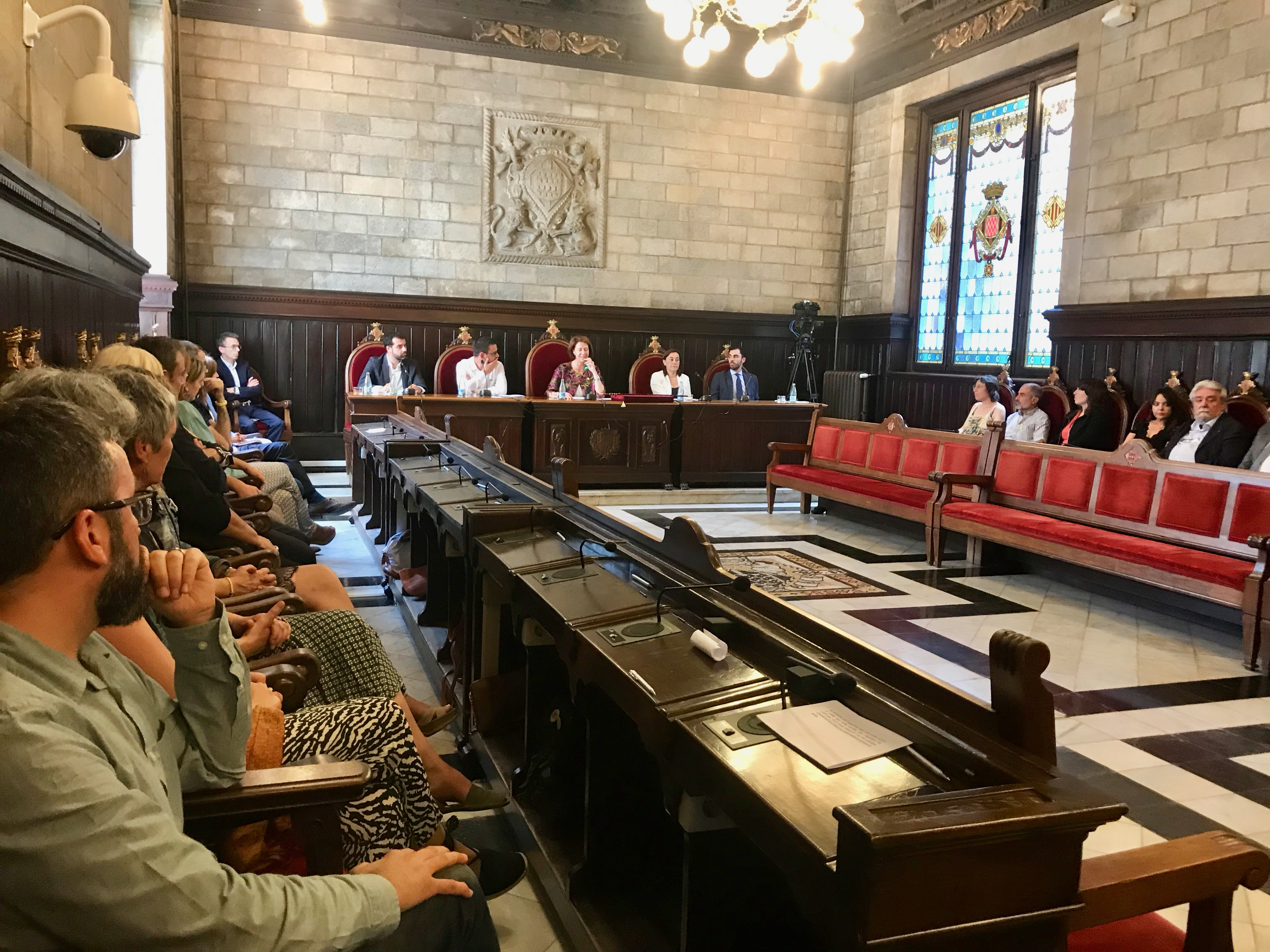 Ple de constitució de l'Ajuntament de Girona 2019